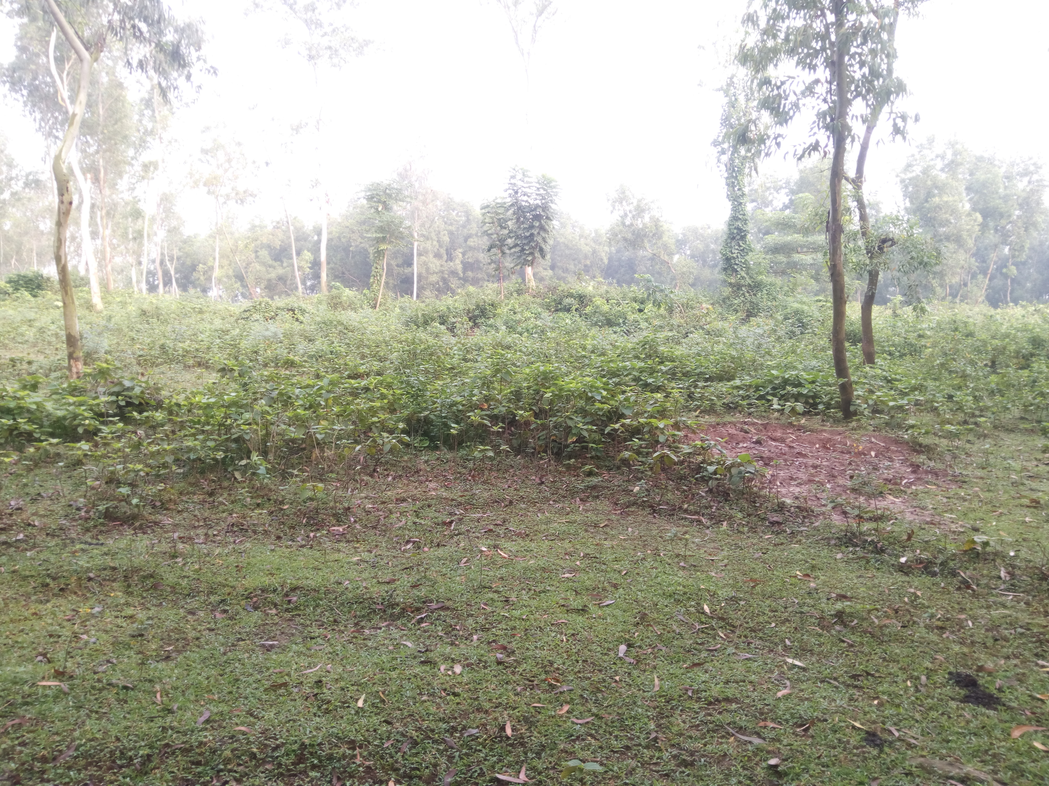 চাপড়াকোট ঢিবি